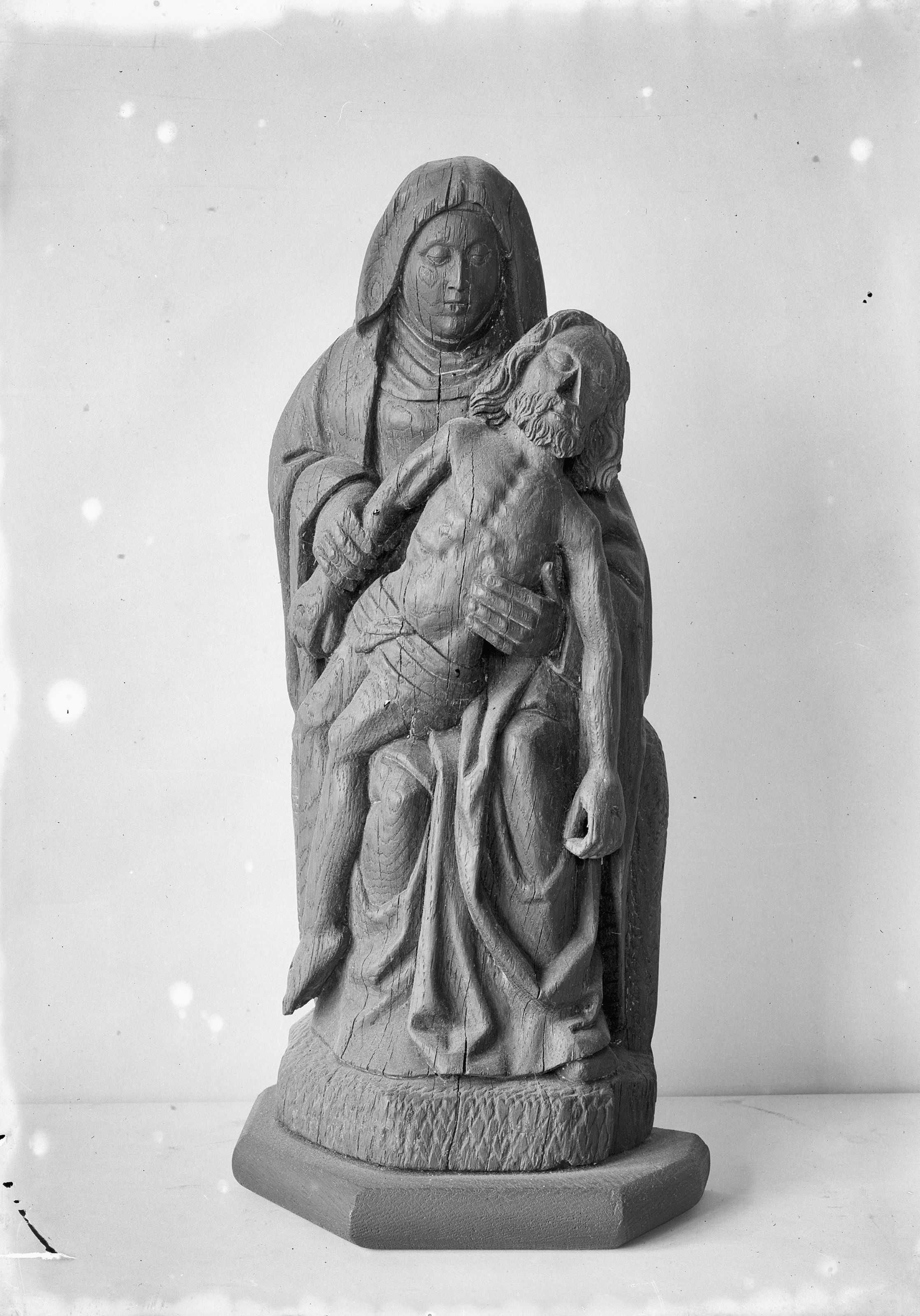 Rooms-Katholieke Kerk Van De Heilige Joseph (Maagdenberg): beelden